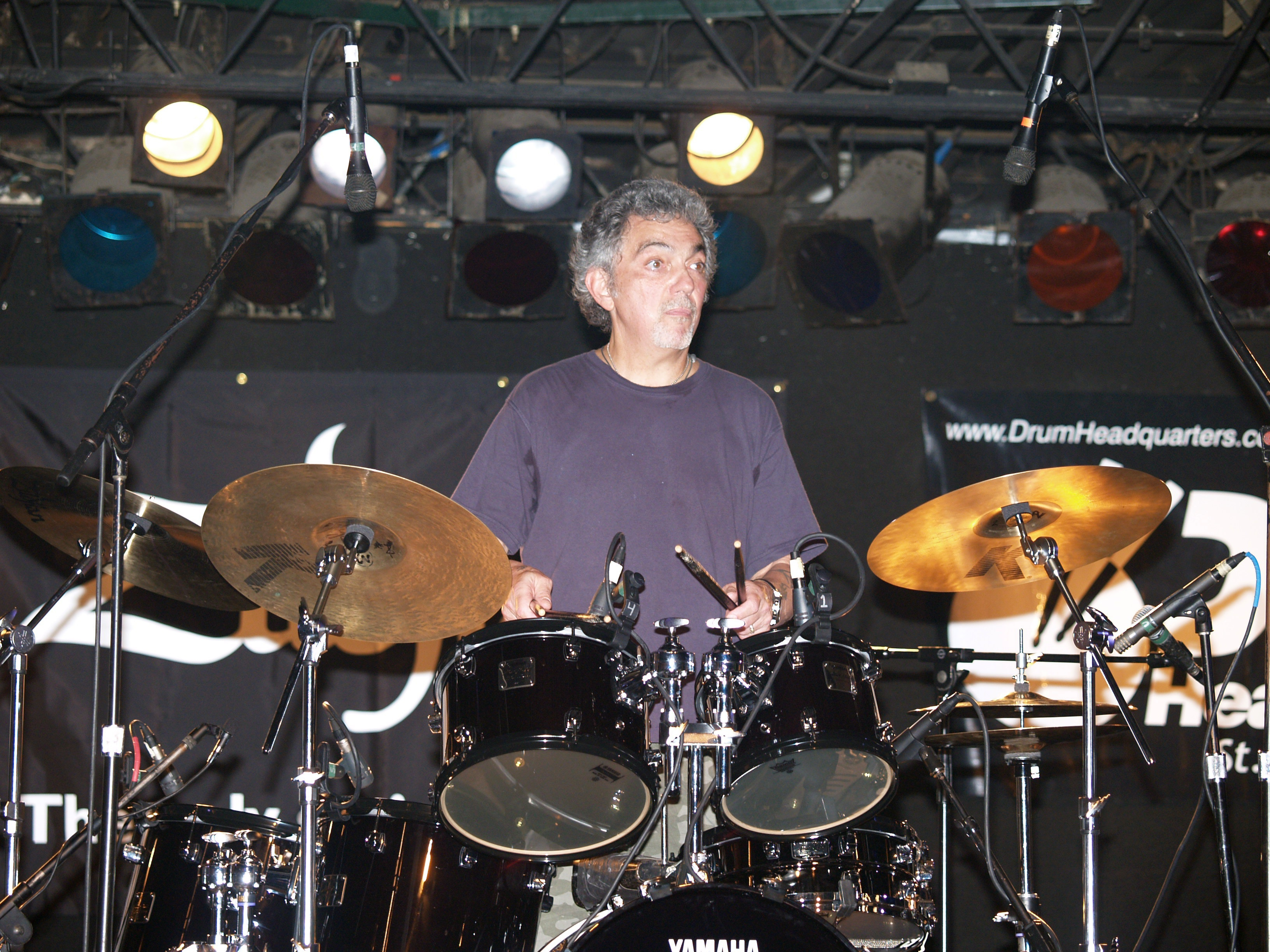 Steve Gadd